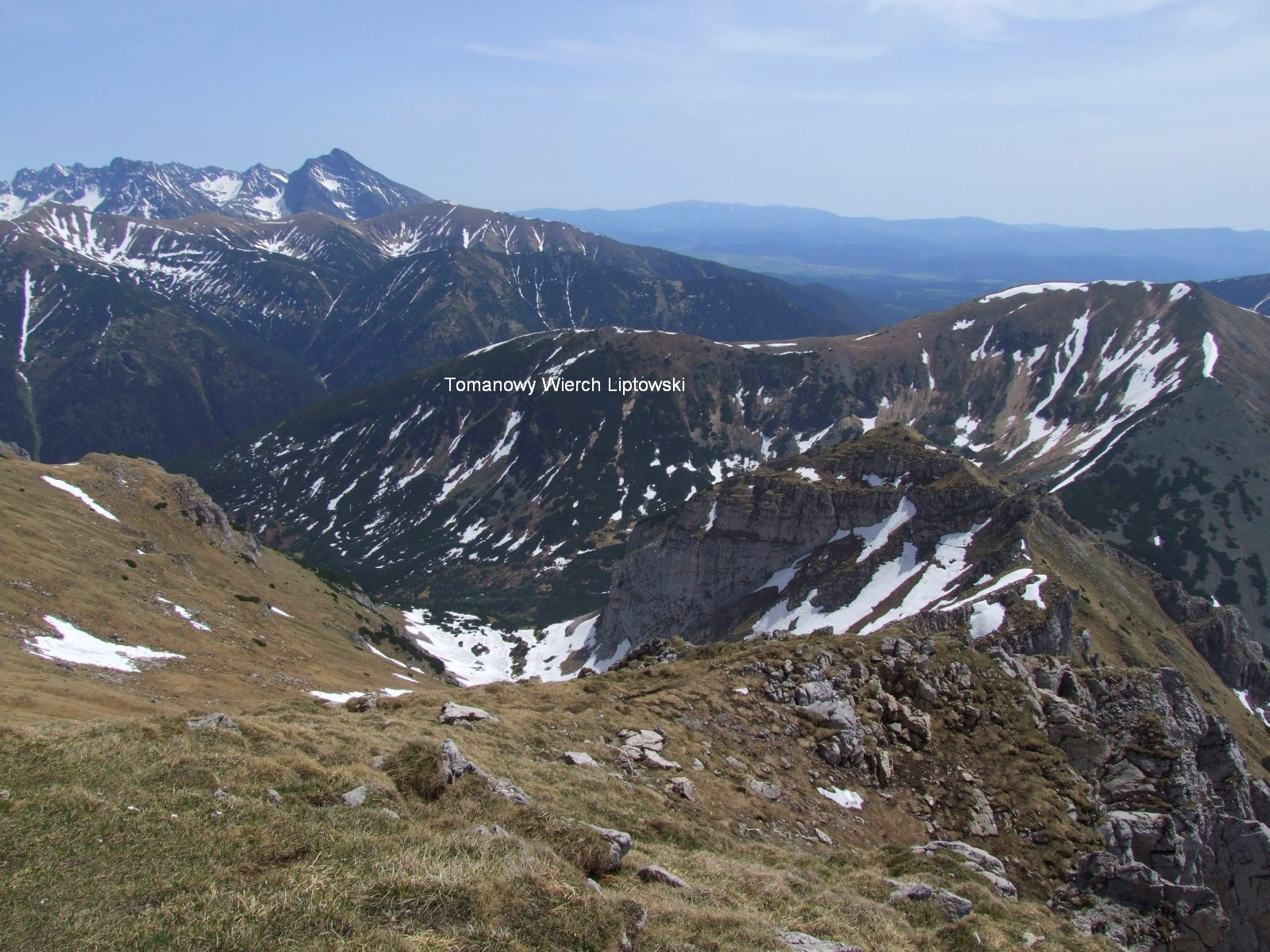 Dolina Cicha i Tatry Wysokie. Na dole Świstówka Liptowska i Dolina Tomanowa Liptowska. Widok z Ciemniaka